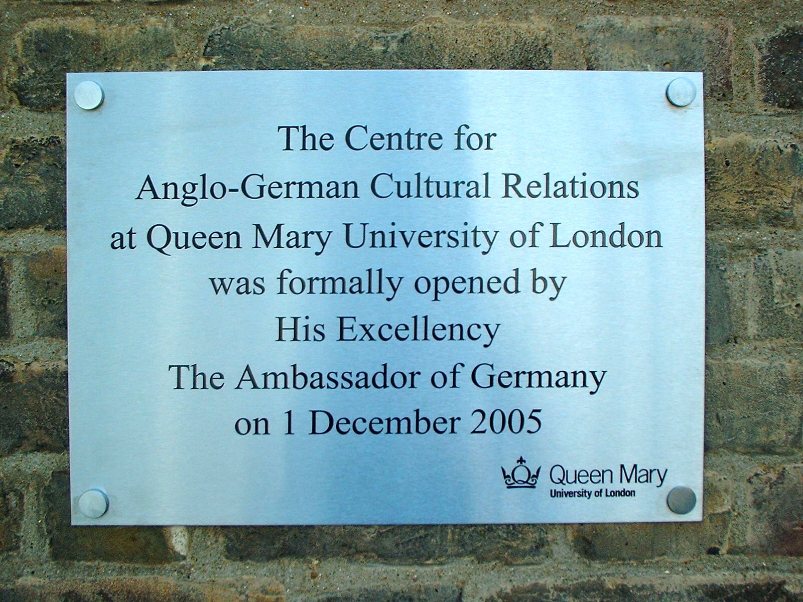 Plakette zur Gründung des Zentrums für Britisch-Deutsche Kulturbeziehungen (Centre for Anglo-German Cultural Relations / CAGCR), angebracht am Lock-keeper's Cottage des Queen Mary College der Universität London (QMUL), Mile End Campus, London E1 4NS.